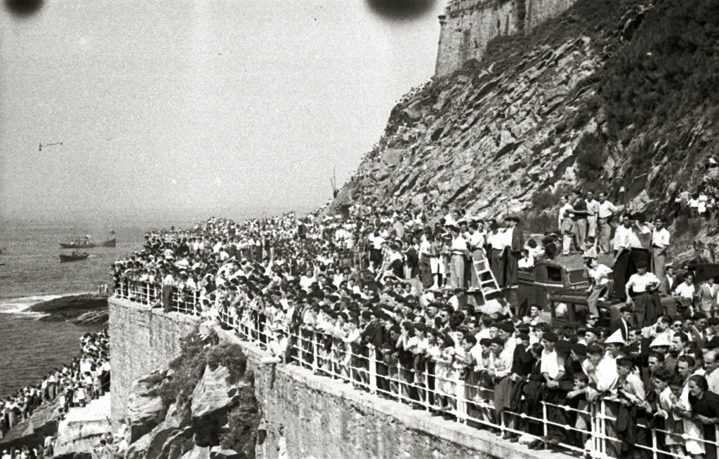 Título original: Escena de la Bandera de la Concha (8/15) Localización: San Sebastián (Guipúzcoa)